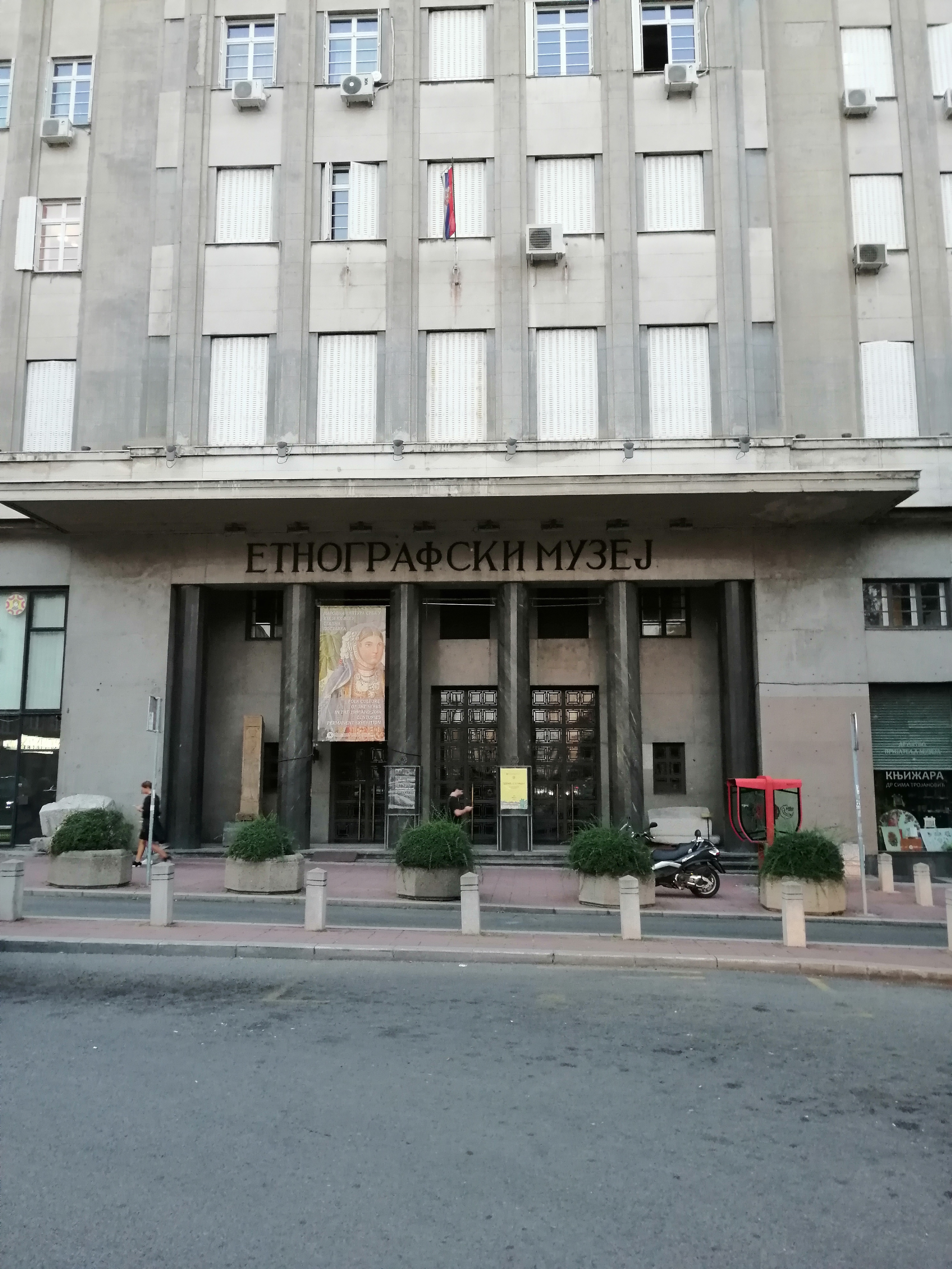 Etnografski muzej u Beogradu